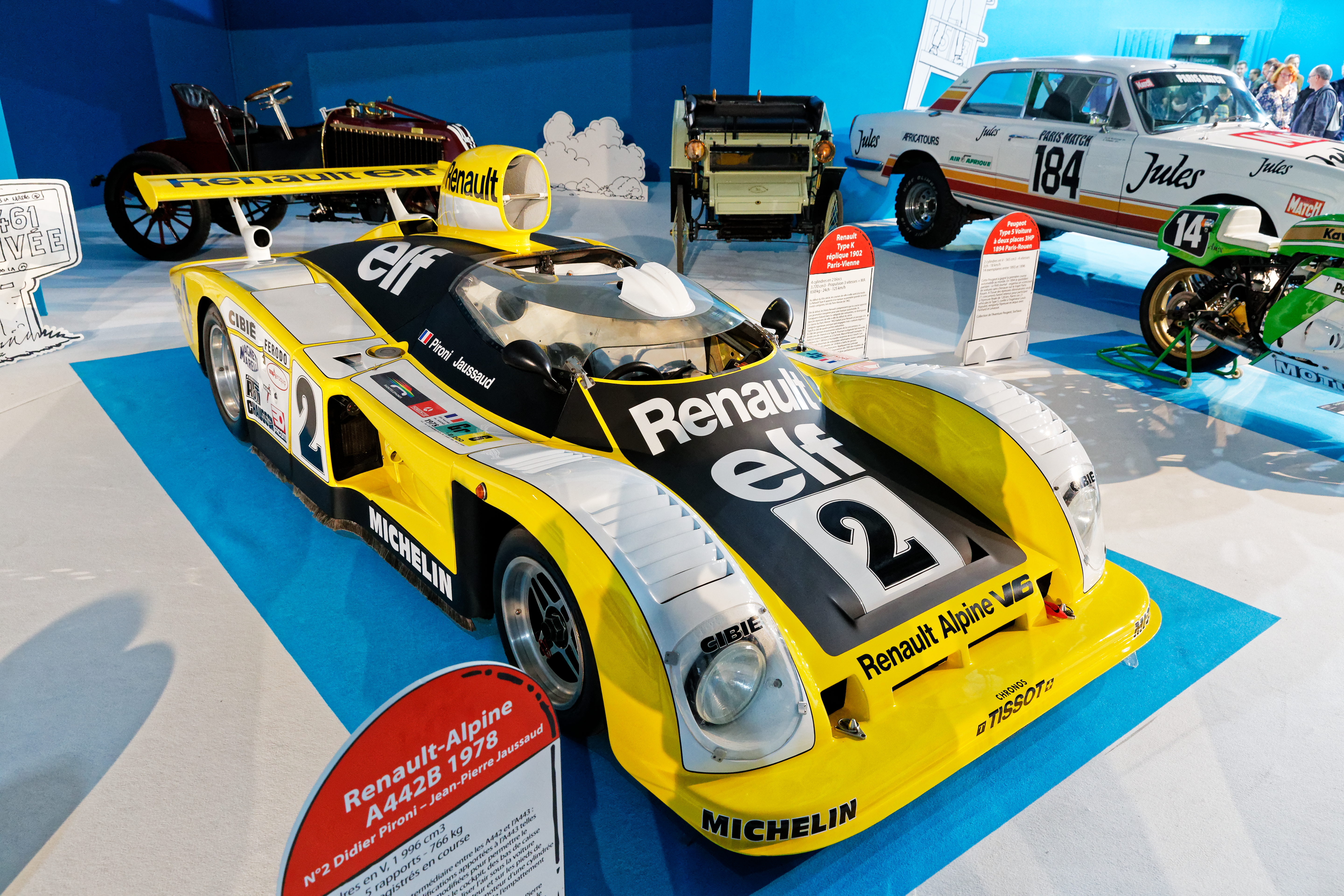 Une Renault-Alpine A442B exposée lors du mondial de l'automobile de Paris 2018.